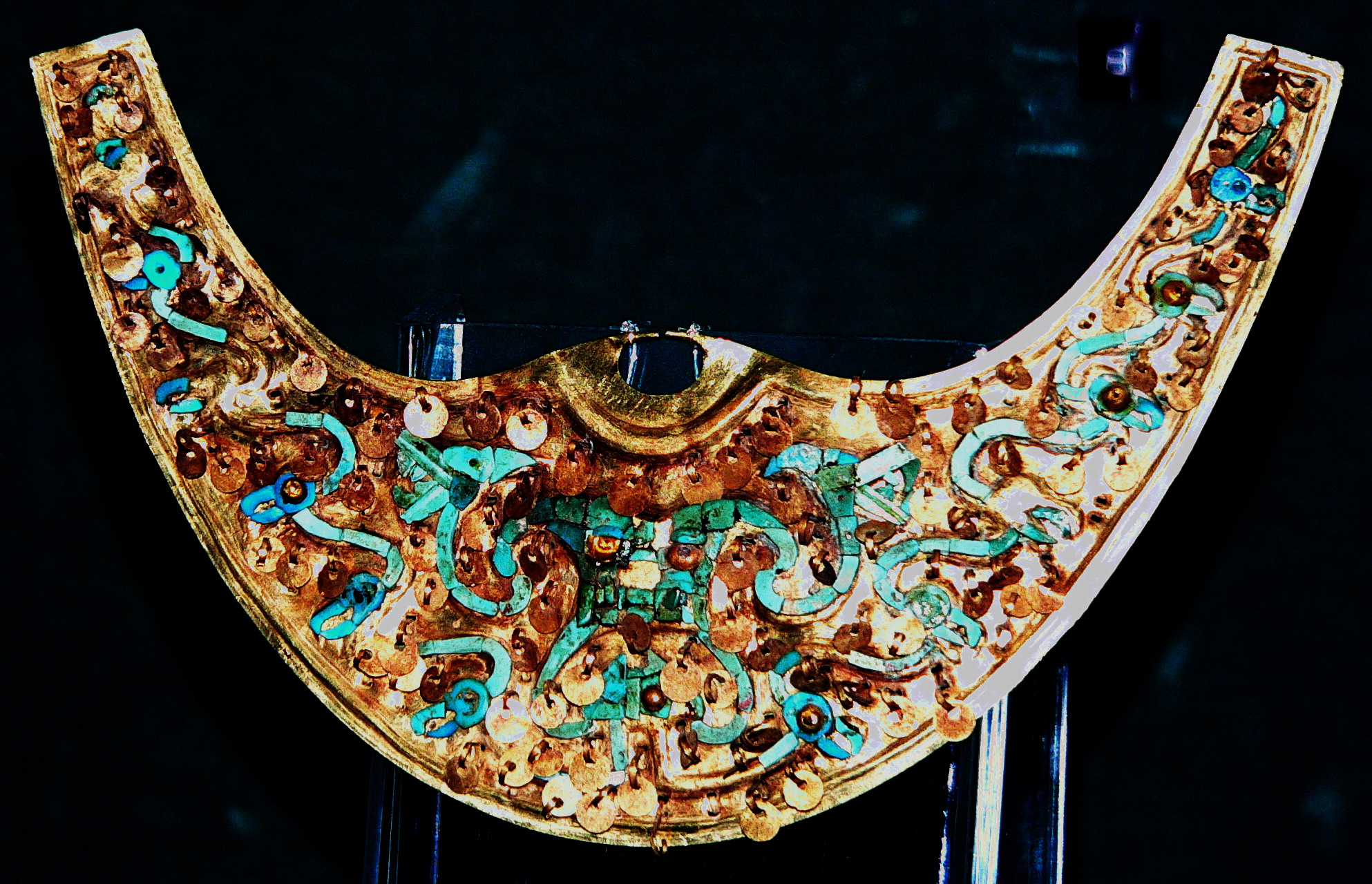 Descripción: Nariguera de oro con incrustaciones de turquesas y crisocolas Cultura: Mochica (200 – 850 d.C.) Fundación: Fundación Miguel Mujica Gallo Museo: Museo Oro del Perú y Armas del Mundo Lugar: Lima, Perú Fotógrafo: © Manuel González Olaechea y Franco Fecha : 13 de julio de 2007